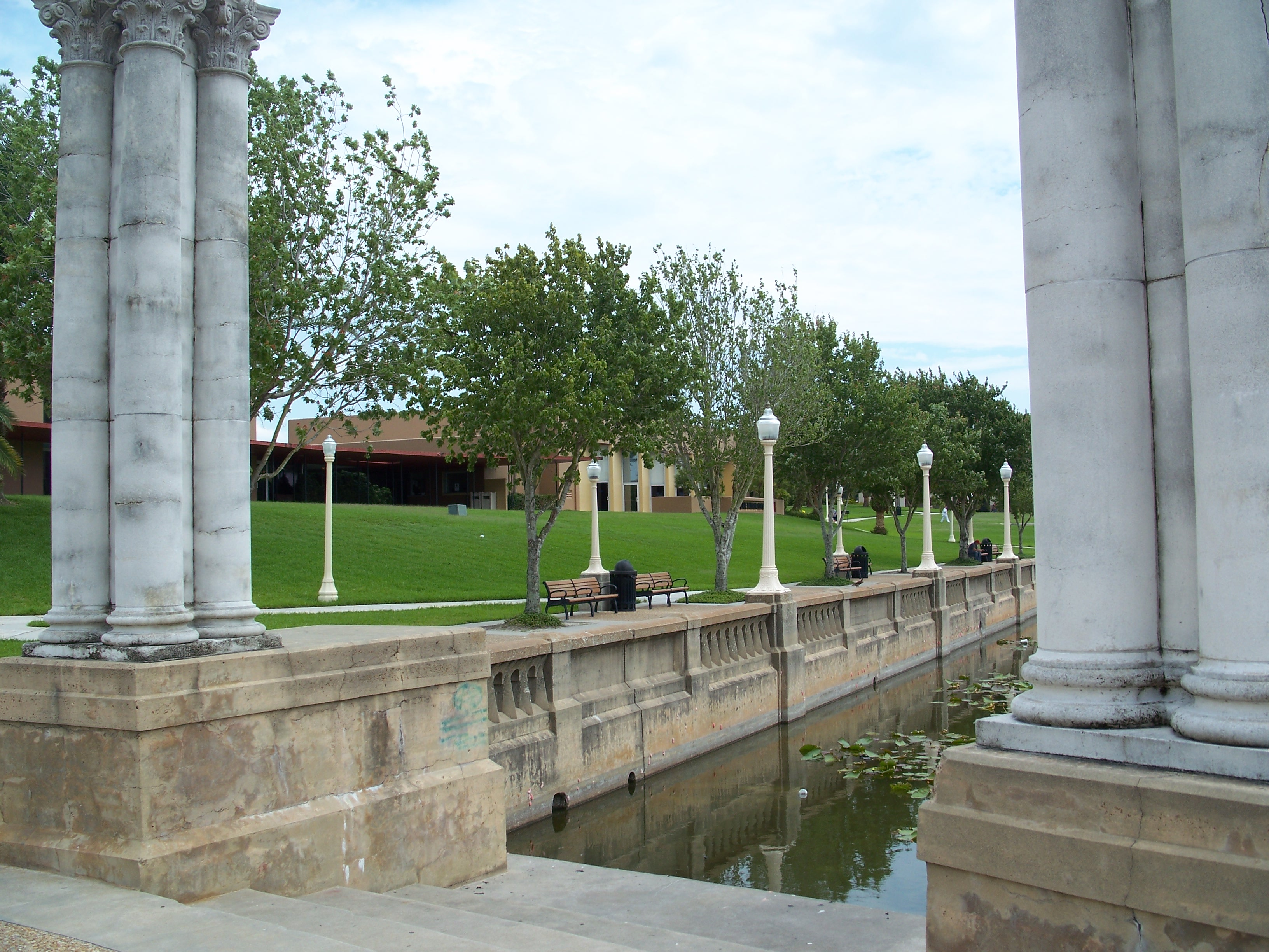 Lakeland: Lake Mirror Promenade